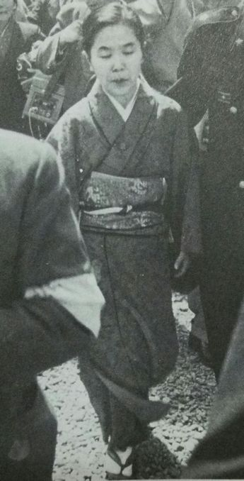 徳島ラジオ商殺人事件冤罪被害者、冨士茂子（一審判決言渡し日の朝）